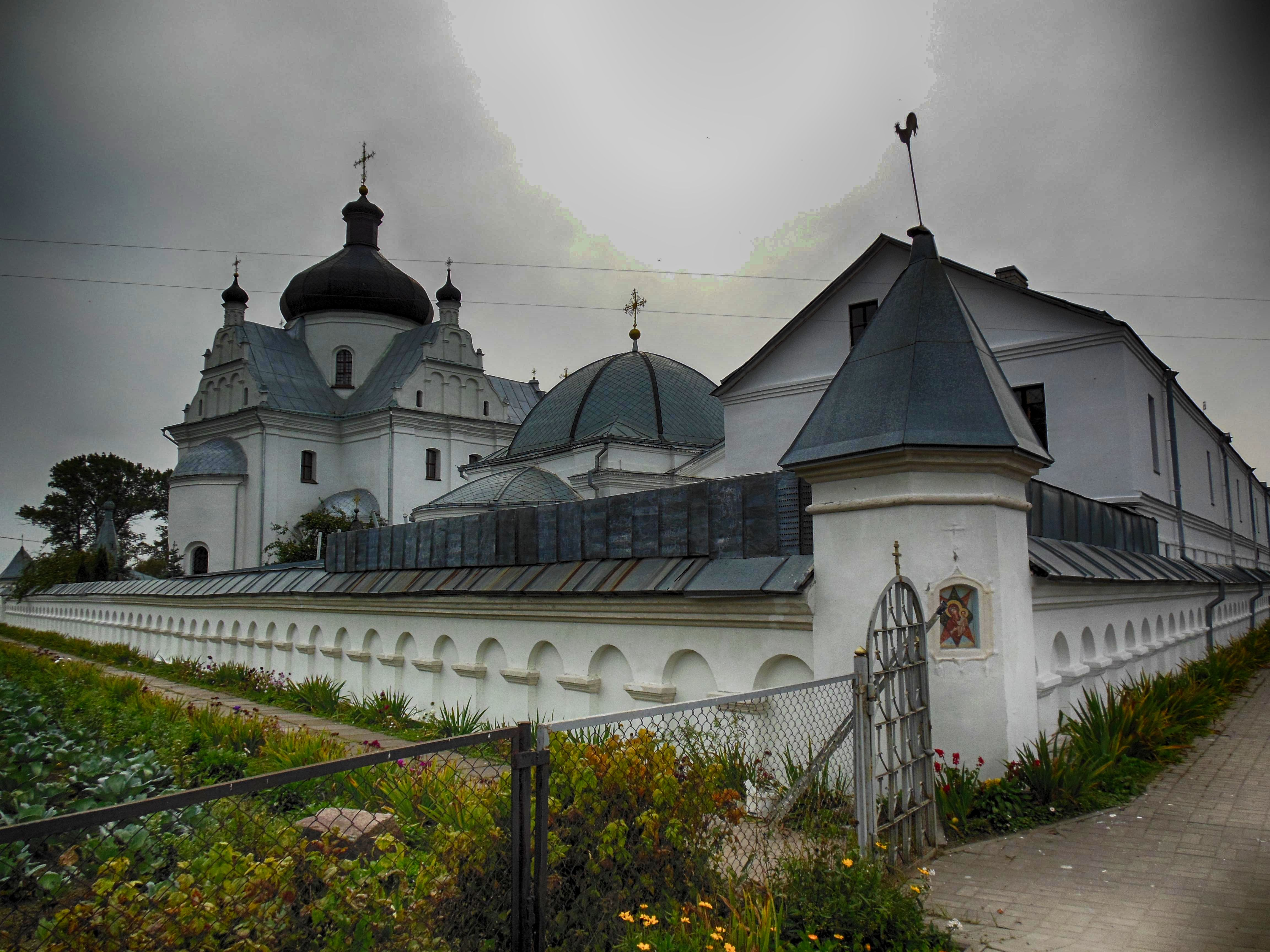 Беларуская (тарашкевіца): Комплекс Мікольскага манастыра ў межах агароджы:званіцажылы дом (шпіталь) Мікольская царквадэкаратыўнае аздабленьне царквы: фрэскі сюжэтныя, фрэскі арнаментальныя, іканастас, арнаментальная ляпнінаАнуфрыеўская царкваагароджа з уязной брамай. г. Магілёў This is a photo of Belarusian heritage monument. Reference number: 511Г000017 ( WLM)